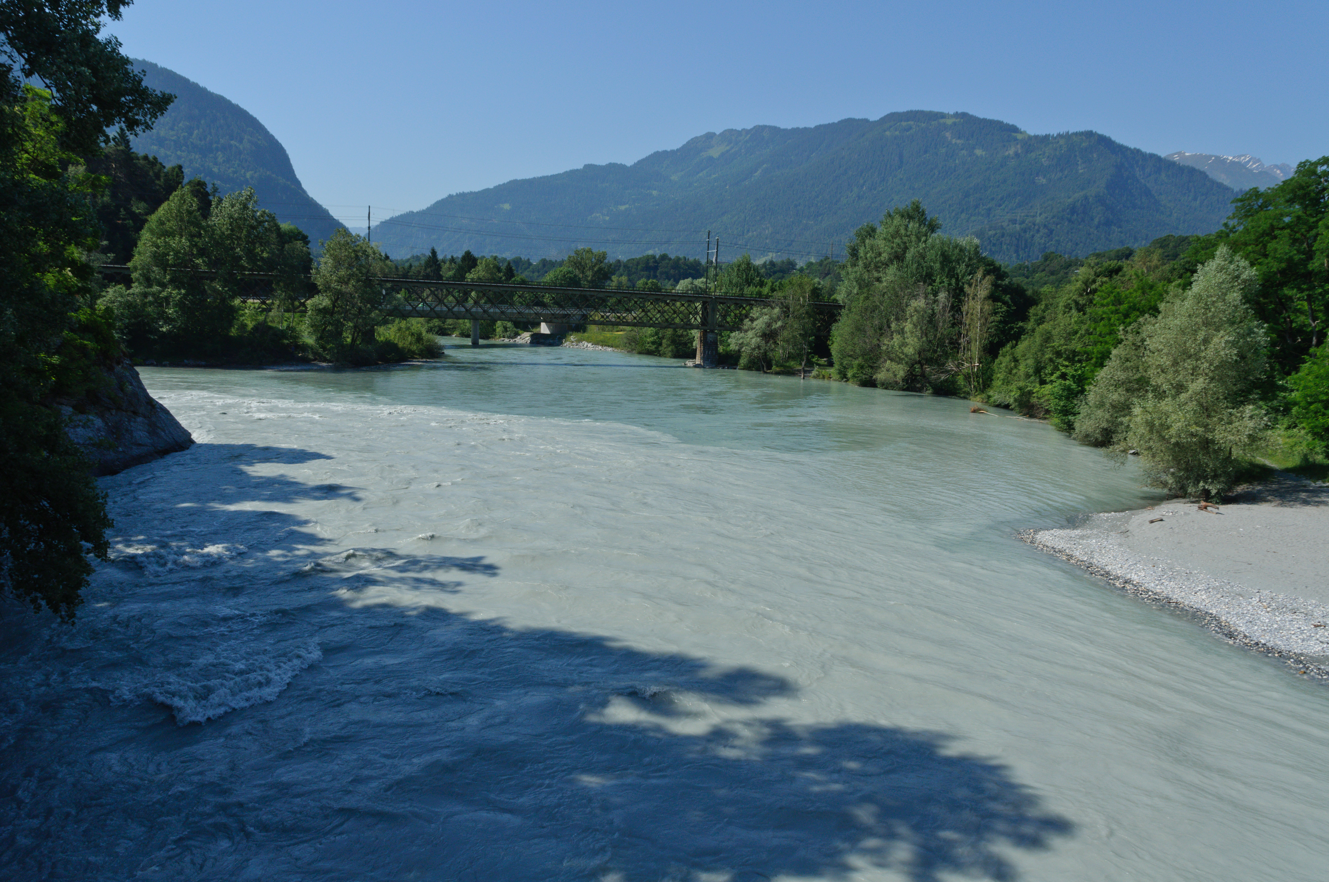 Hinterrheinbrücke Reichenau der Rhätischen Bahn, Zusammenfluss von Vorderrhein (milchig, vorn) und Hinterrhein (hinten)